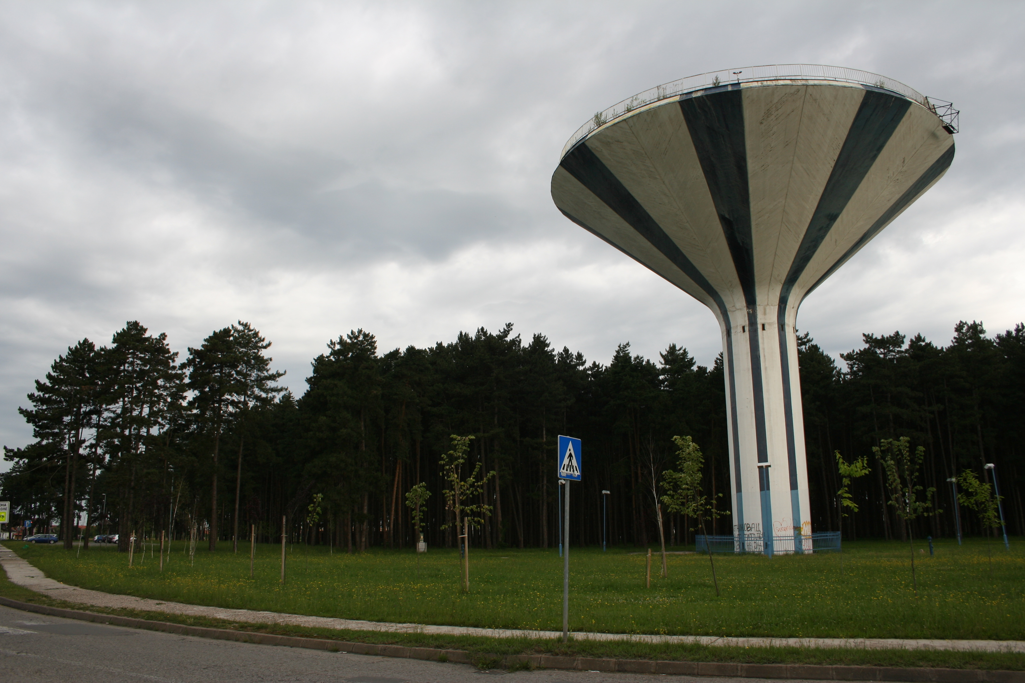 Vodotoranj na Letnjikovcu